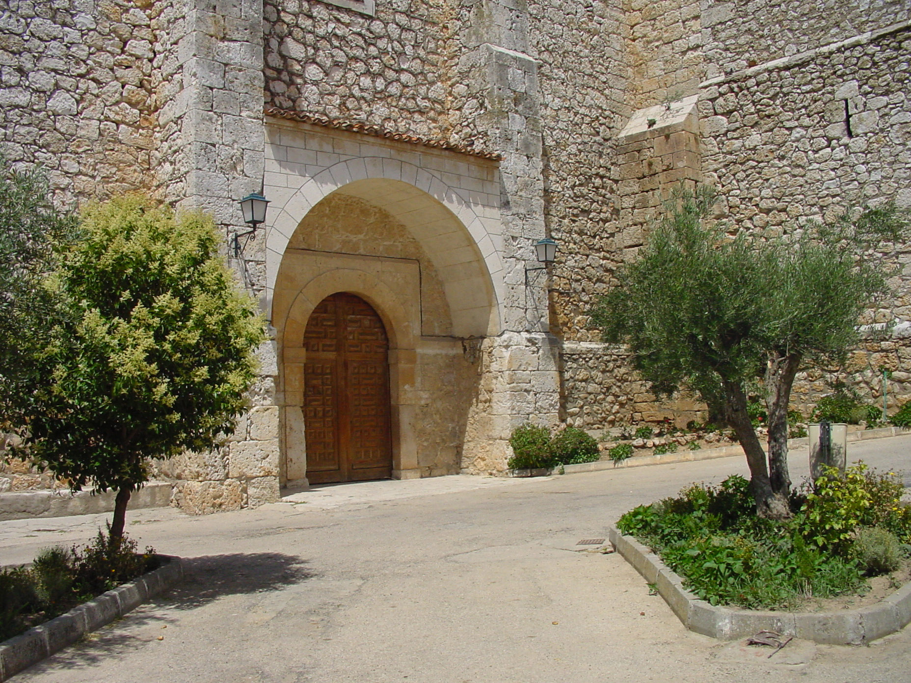 Puerta de Iglesia en Belmonte de Tajo.